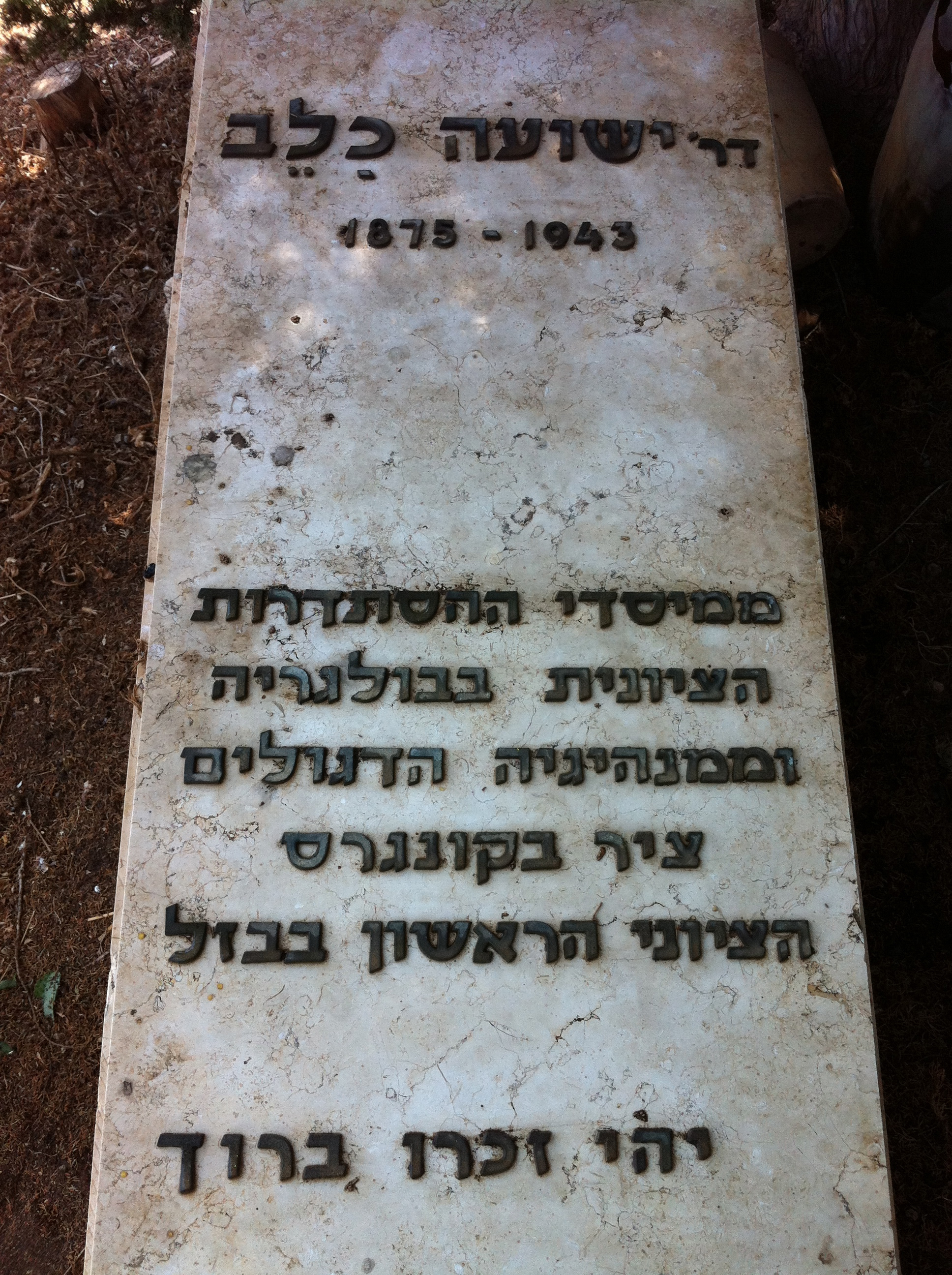 מצבתו של ד"ר ישועה כלב ממייסדי התנועה הציונית וציר לקונגרס הציוני הראשון. צולם בבת העלמין בישוב בית חנן.